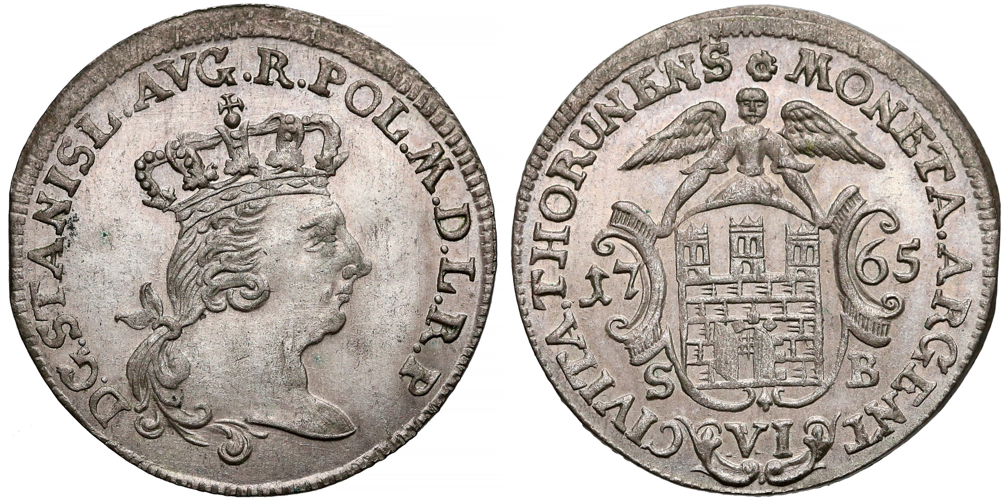 Szóstak miejski Toruń 1765